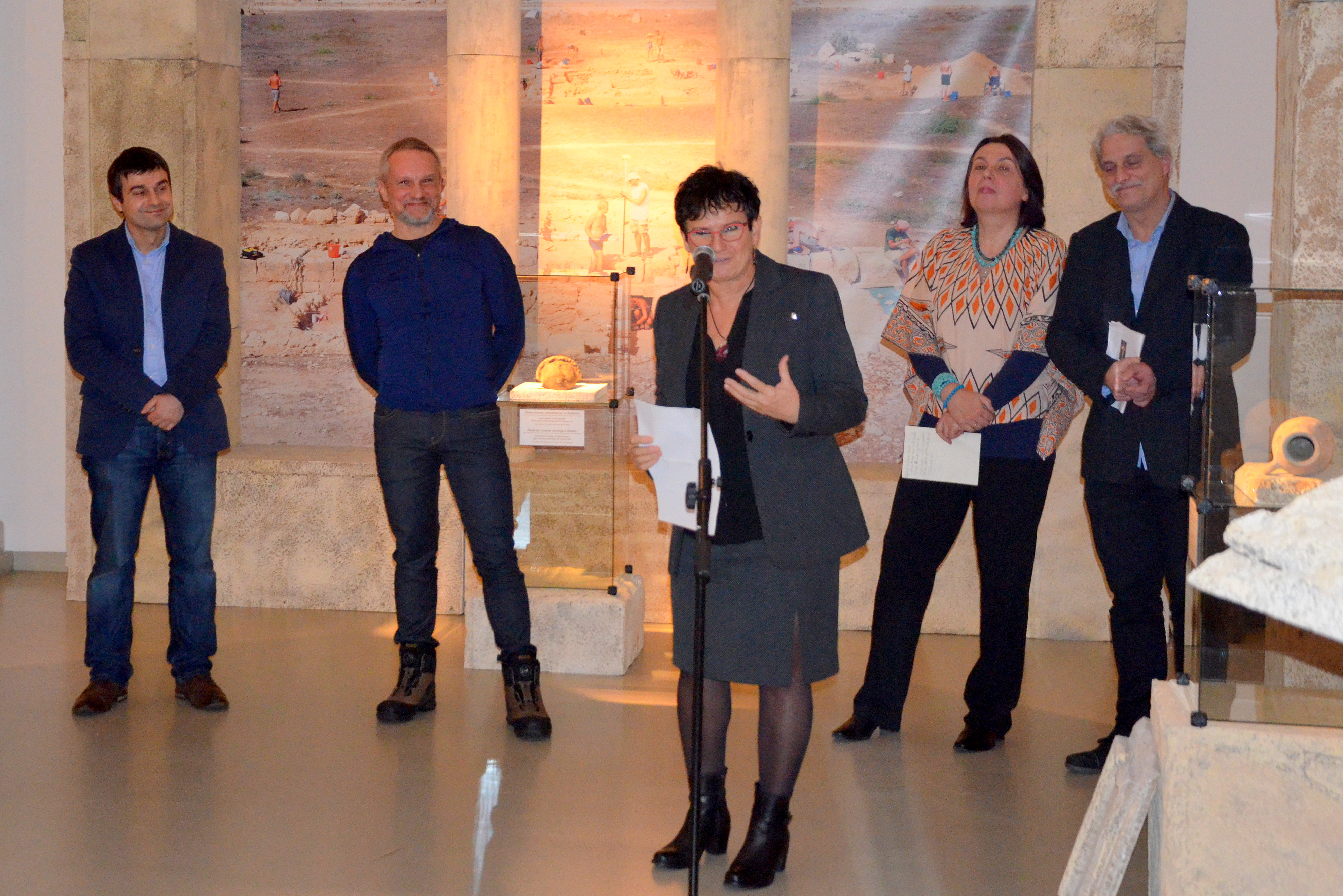 Ewdoksia Papuci-Wladyka, Agora von Paphos